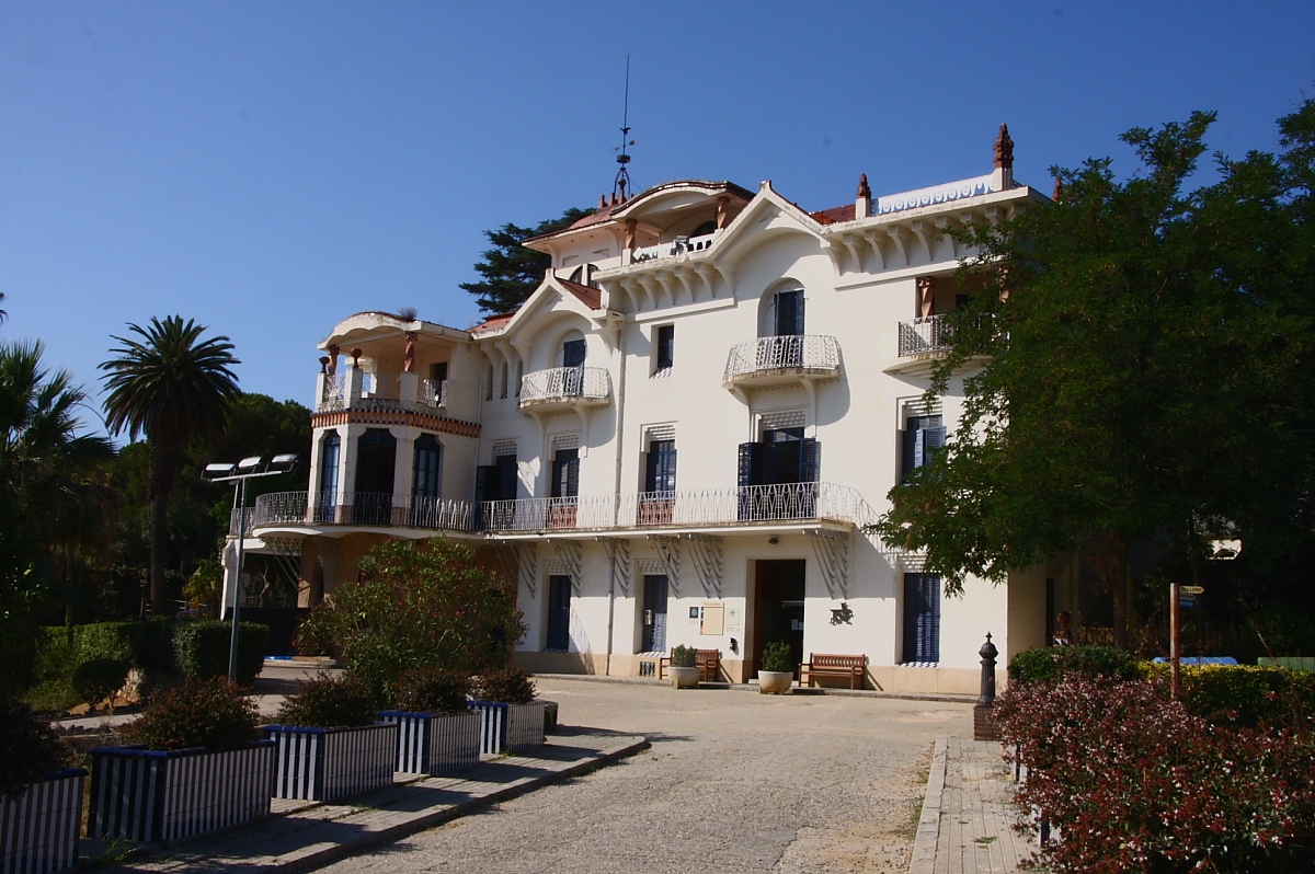 Casa d'estiueig de 1910, encàrrec de Ramiro Busquets, un terratinent i industrial. L'obra és d'Eduard Ferrés i Puig feta en un estil modernista elegant i amb gran cura pels detalls, com els esgrafiats interiors i la forja de les baranes. Està ubicada a Canet de Mar (Maresme, Catalunya). Es coneix com Vil·la Flora.